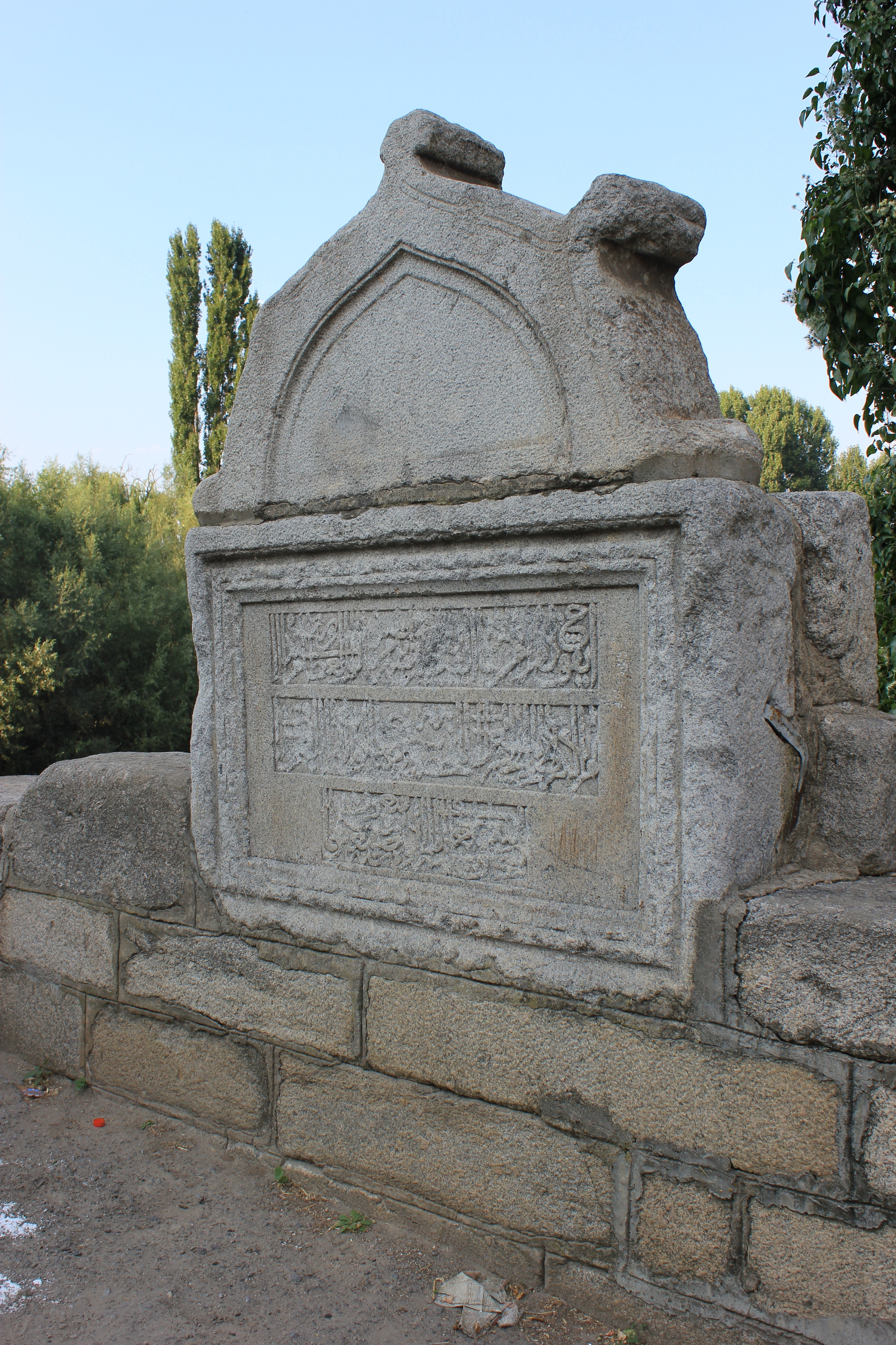 Hornjoserbsce: Mostowy kamjeń na starym osmanskim mosće w Nevestinje, Bołharska.